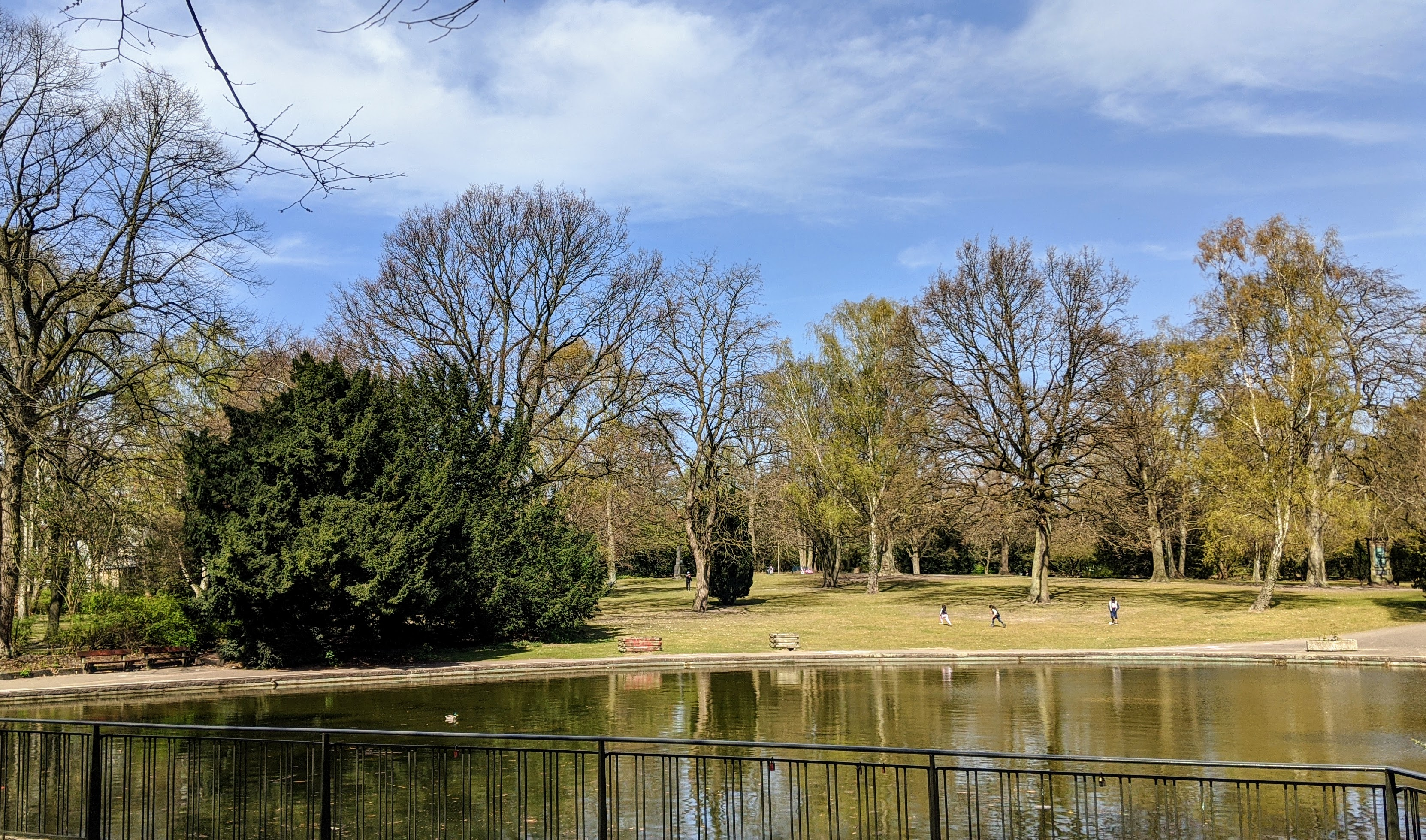 Jacobipark in Hamburg-Eilbek, Blick über den Parkteich in den nördlichen Teil des Parks